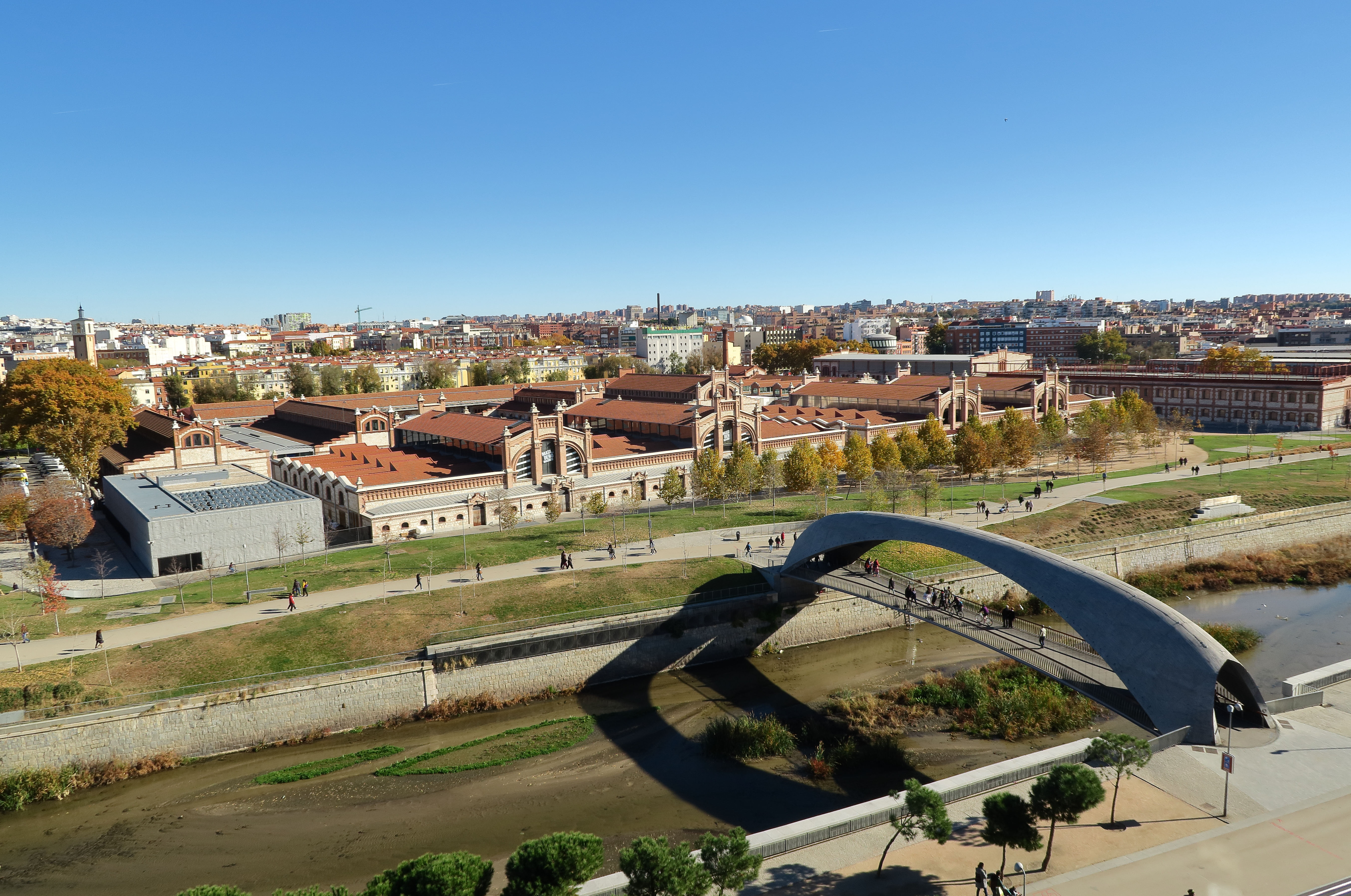 Matadero y puente de Matadero, Arganzuela, vista desde Madrid Río 2